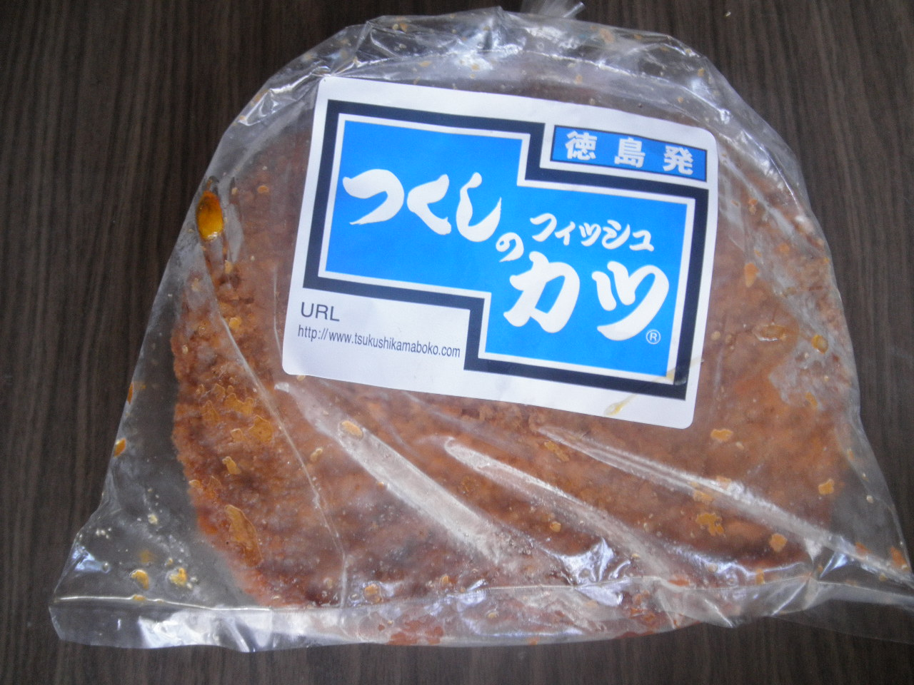 フィッシュカツ